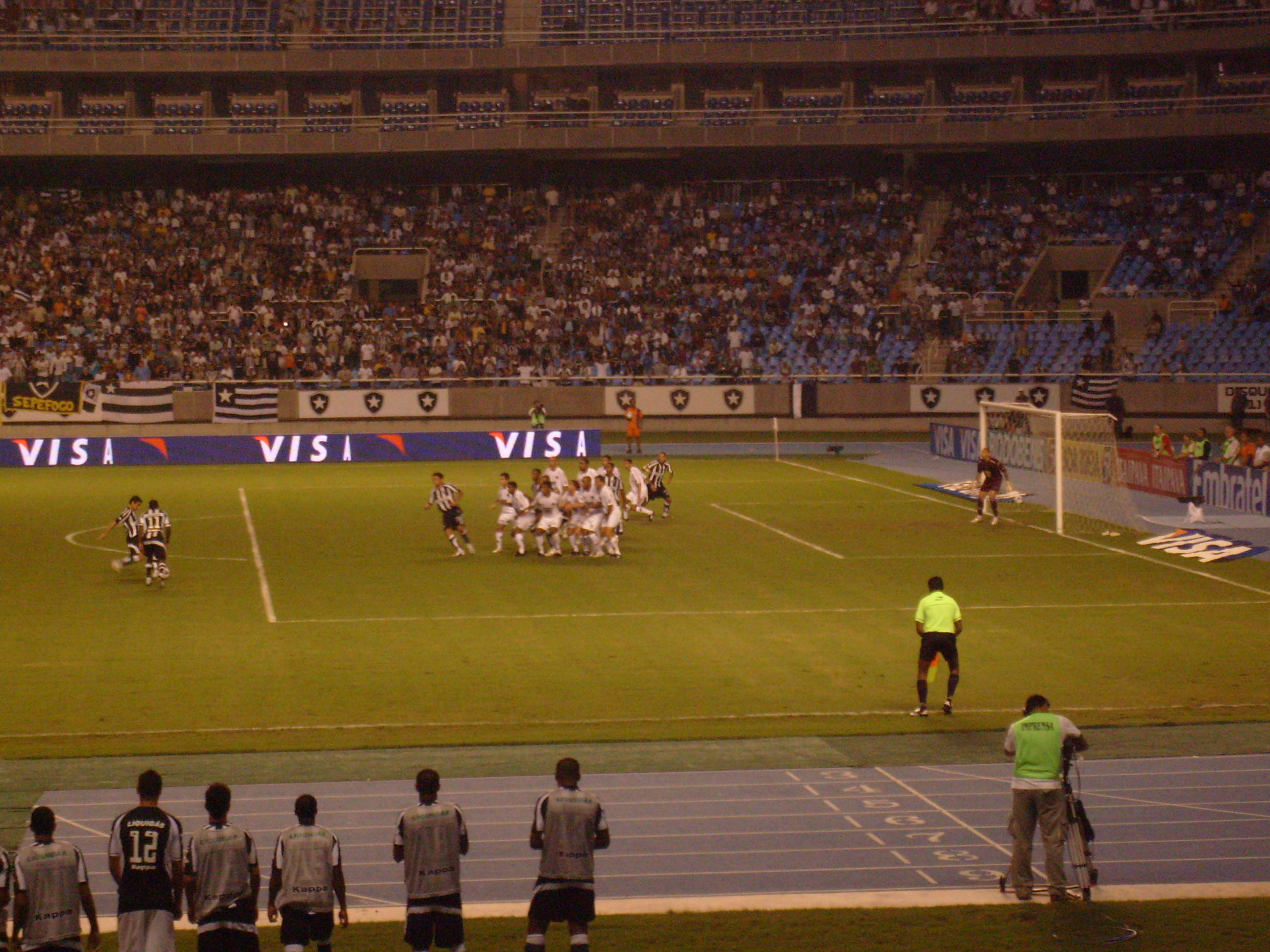 Foto do duelo entre Botafogo e Atlético Mineiro no Estádio Olímpico João Havelange, o Engenhão, válido pela Copa do Brasil de 2008, vencido pelo Botafogo por 2 a 0 em 14 de maio do mesmo ano. Na foto, Lúcio Flávio corre para cobrar uma falta.